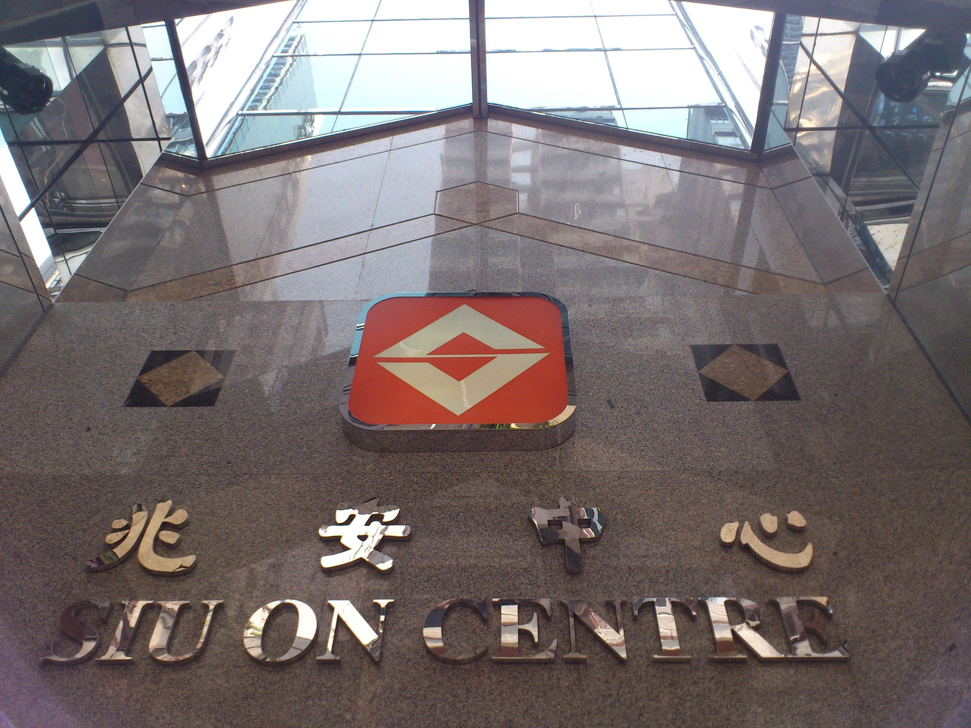 中文（香港）: 兆安中心正門出入口